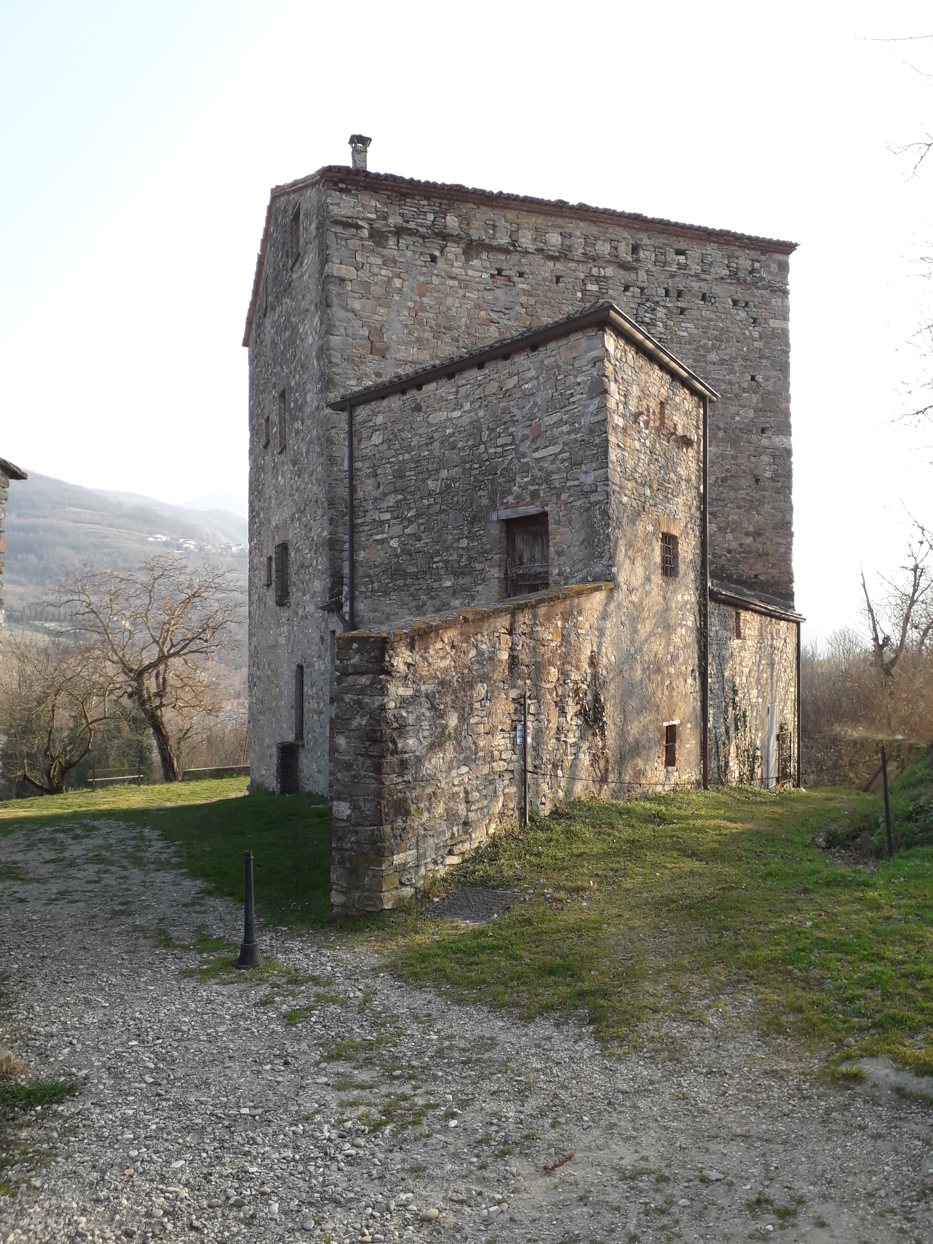 Torre di Cadonica, frazione di Bobbio, PC